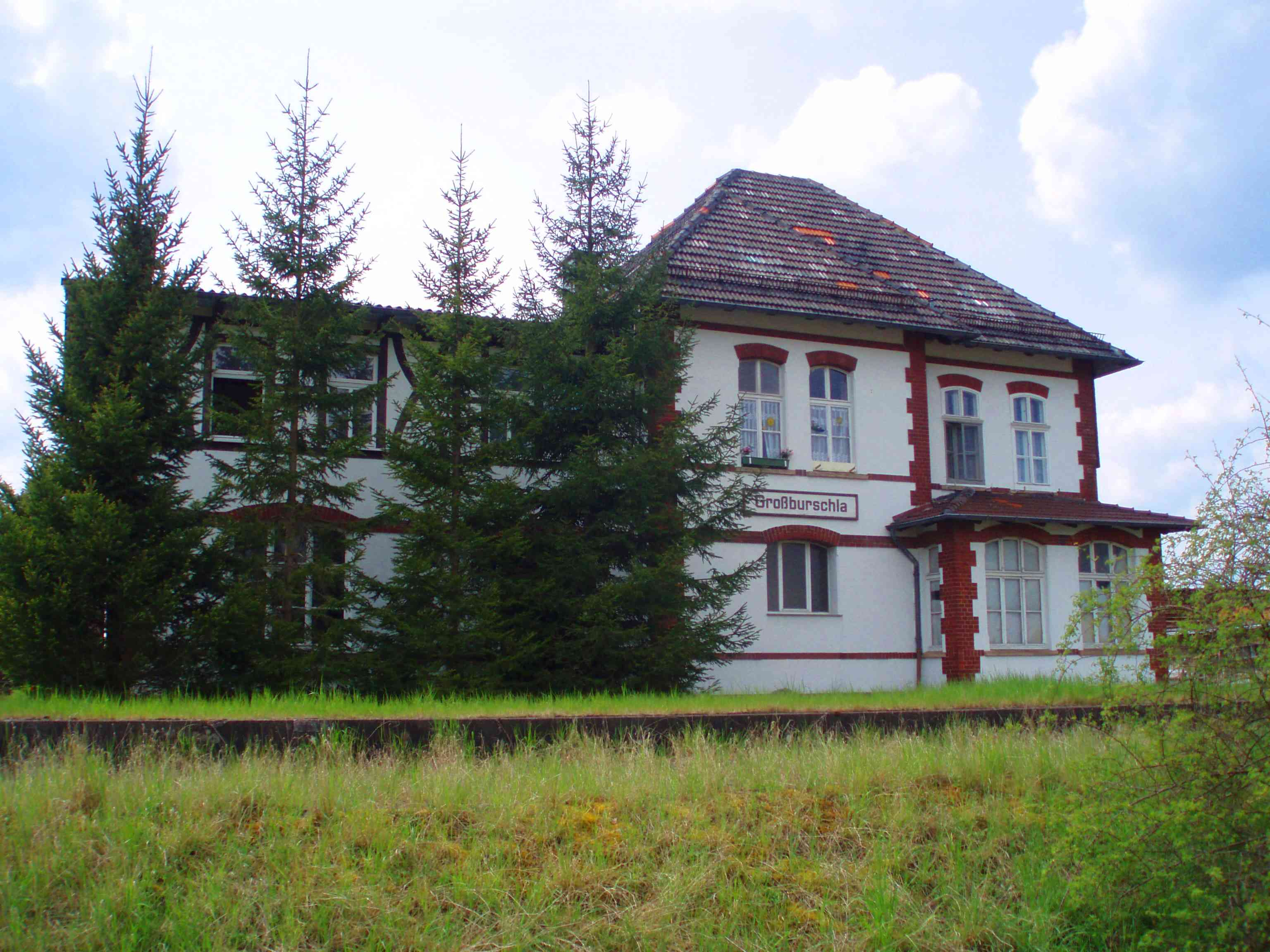 Ehem. Bahnhof Großburschla